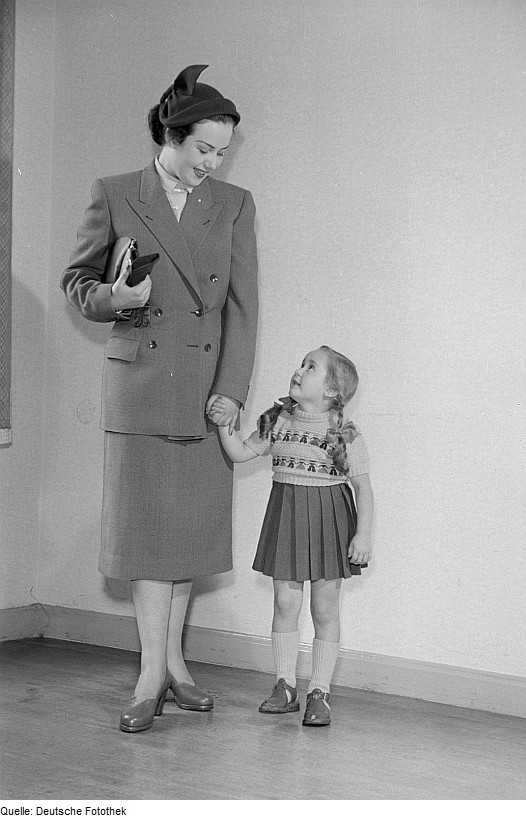 Original image description from the Deutsche FotothekEine Frau und ein Mädchen posieren bei der "Internationalen Messemodenschau", Herbstmesse 1953